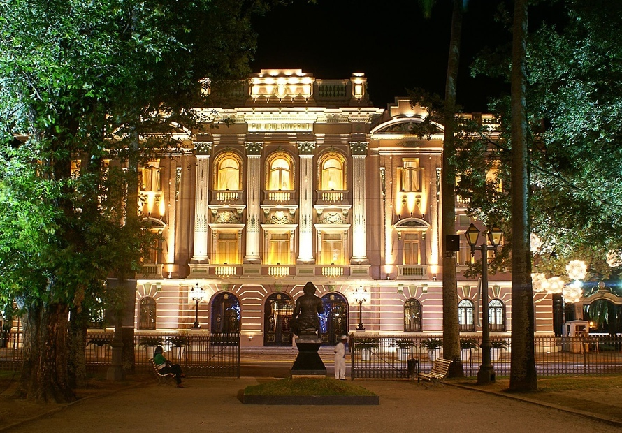 Palácio do Campo das Princesas - Recife - Pernambuco - Brasil